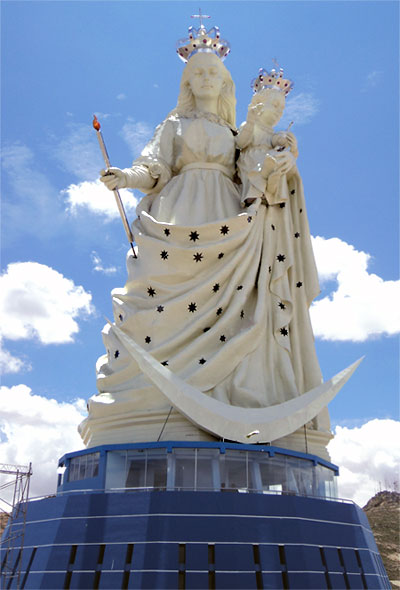 Monumento a la Virgen del Socavón (Virgen candelaria) en la inauguración oficial, 1 de febrero del 2013 a vísperas del Carnaval de Oruro y día de la candelaria el 2 de febrero. Oruro, Bolivia. This medium shows the protected monument with the number O/00-020 in Bolivia.